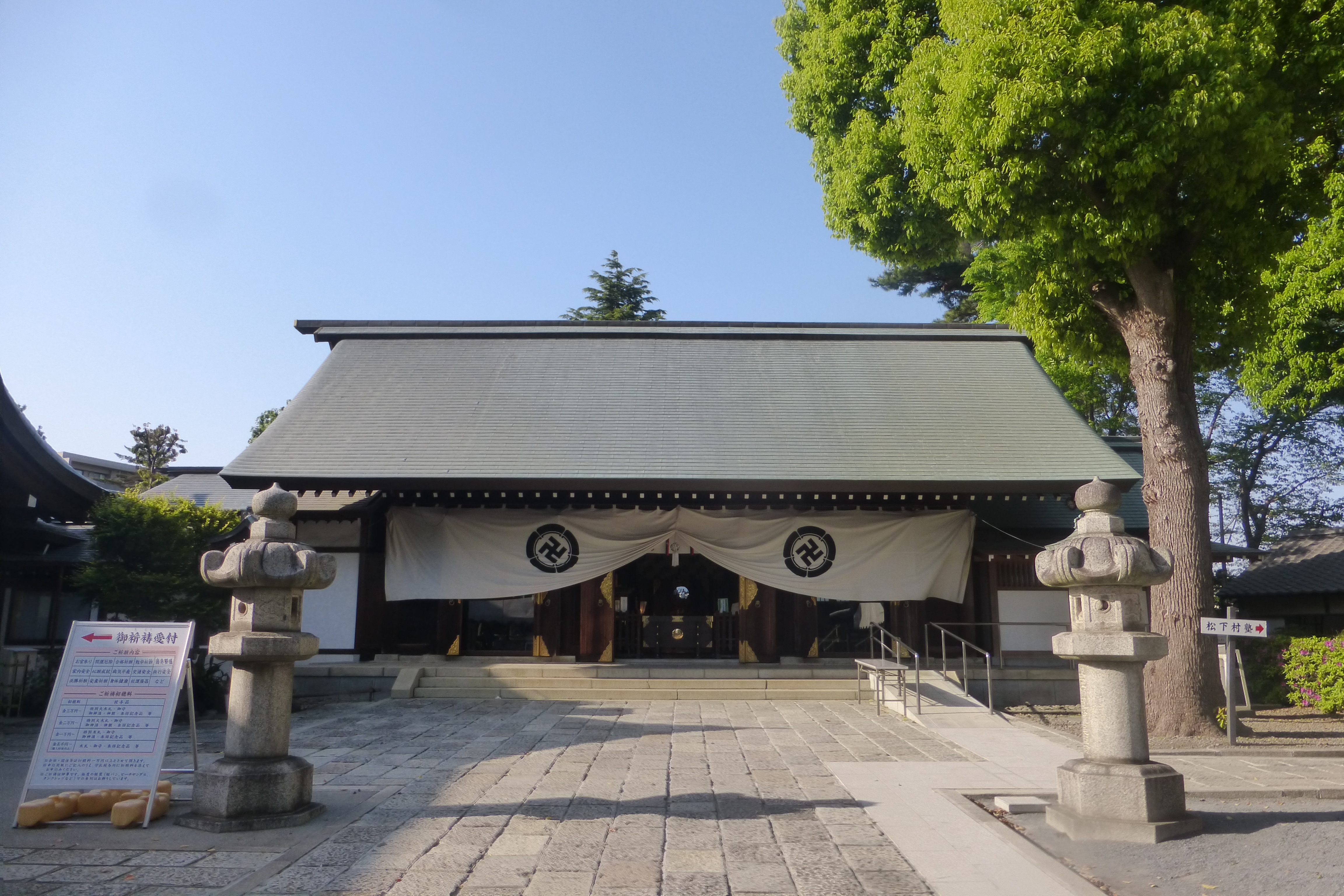 松陰神社 (Shōin-jinja shrine)